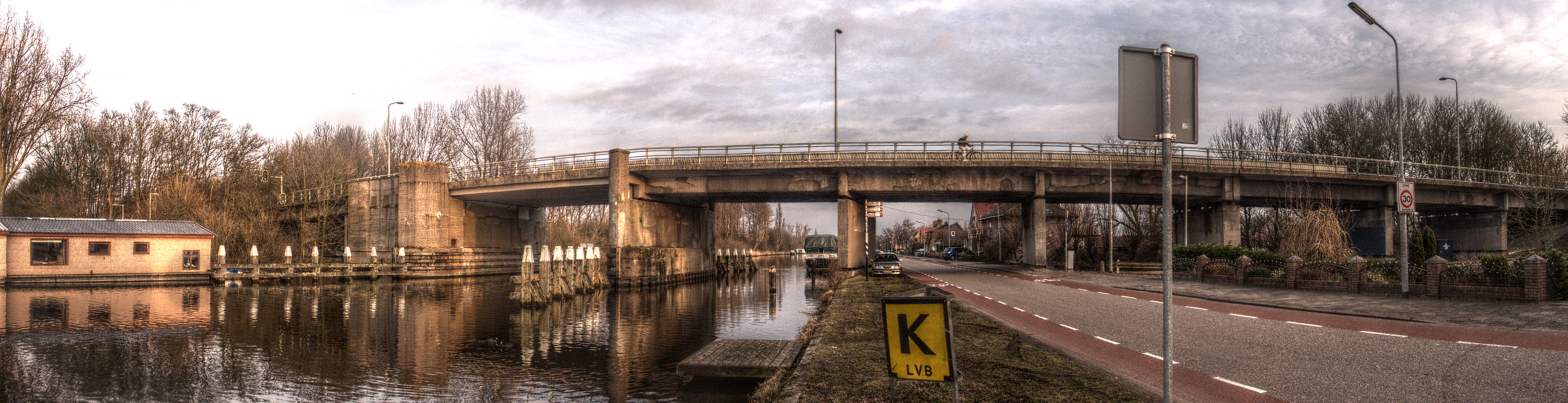 De Oude Haagsebrug in de voormalige Rijksweg 4 over de Ringvaart tussen Amsterdam en Harlemmermeer